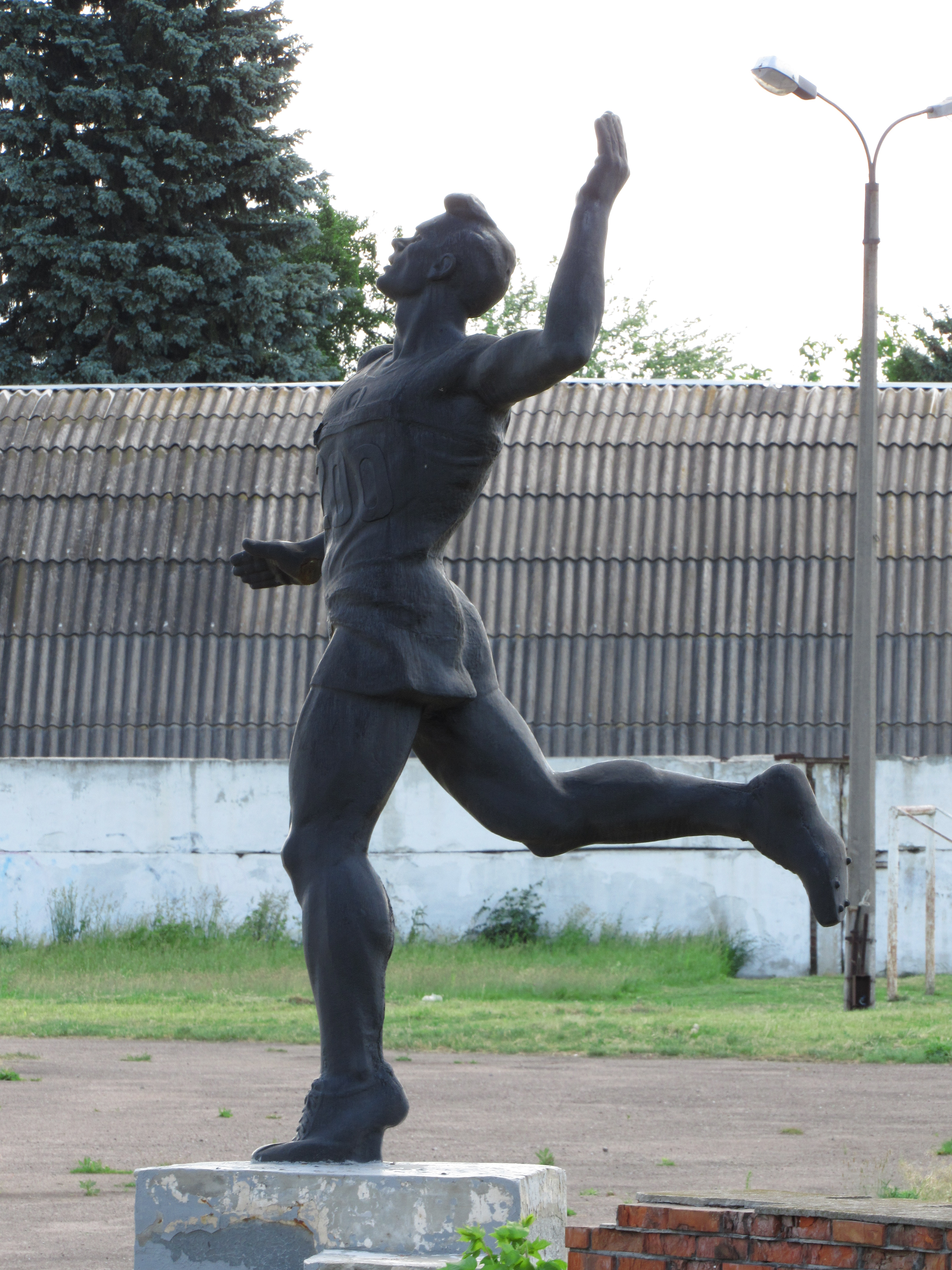 Пам'ятник олімпійському чемпіону В. П. Куцу, Тростянець, стадіон